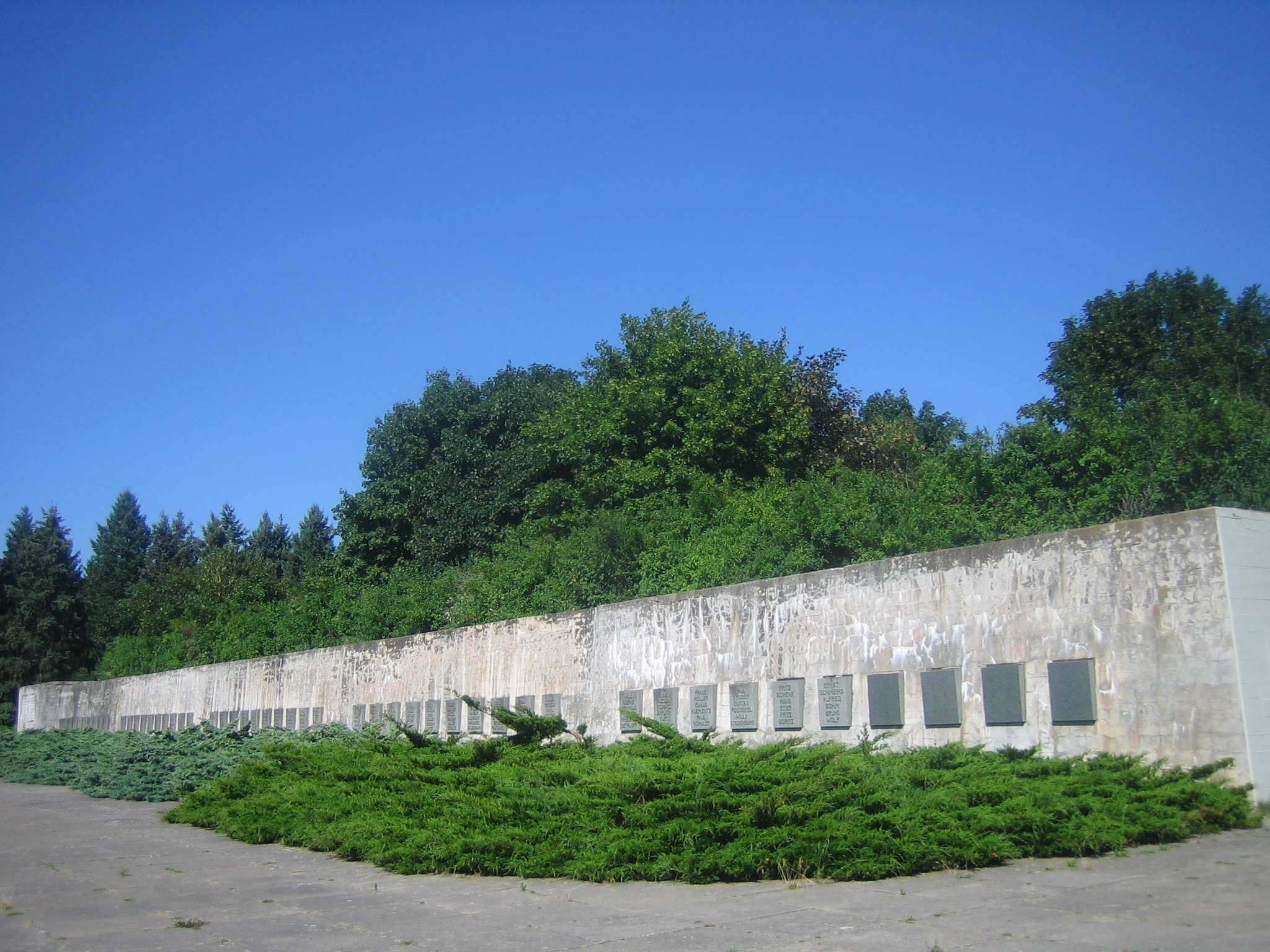 Antifaschisten-Ehrenmal, südlich Neuer Friedhof, Neubrandenburg Mecklenburg-Vorpommern